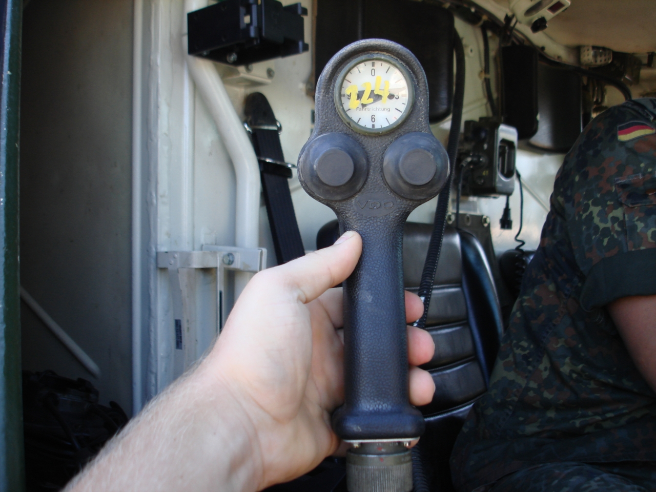 Schwimmgriff des Transportpanzer 1 Fuchs. Er dient dem Kommandanten zum Steuern des Fuchs' während der Wasserfahrt.